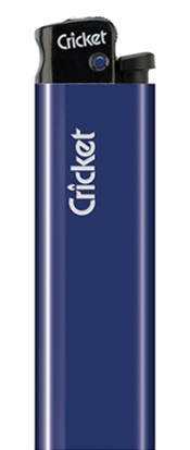 Одноразовая зажигалка Cricket синего цвета